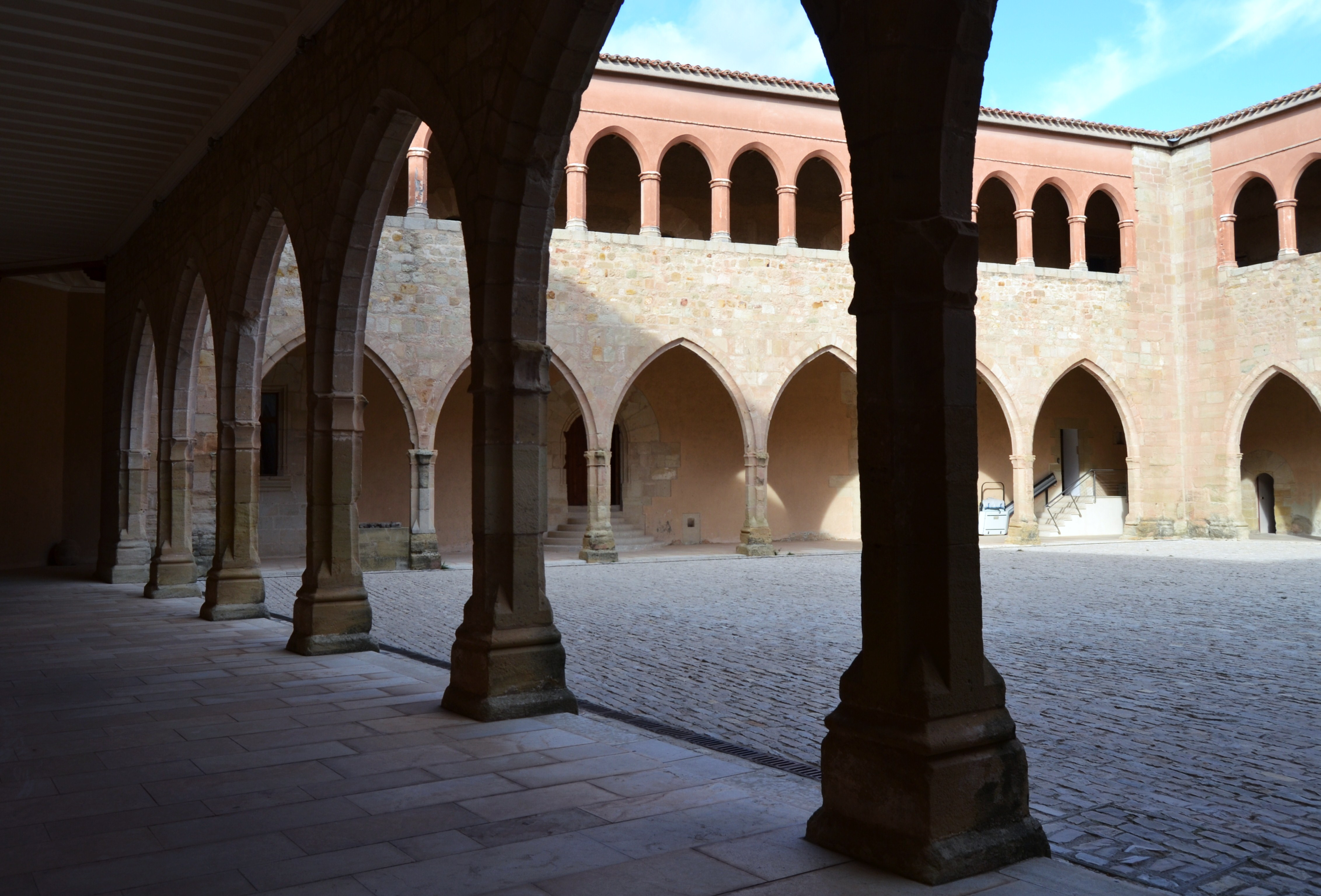 Castell de Móra de Rubiols, arcades del pati.